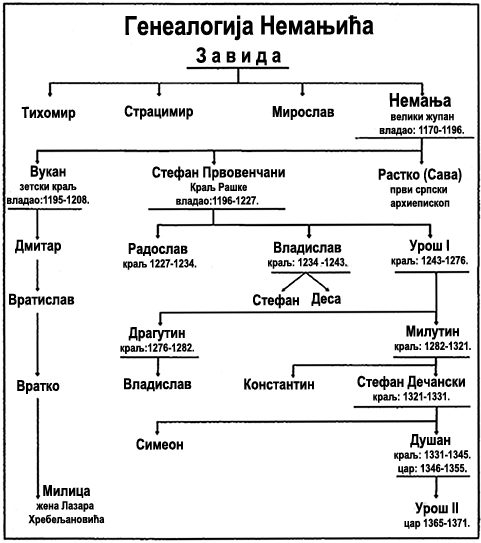 Лоза династије Немањића